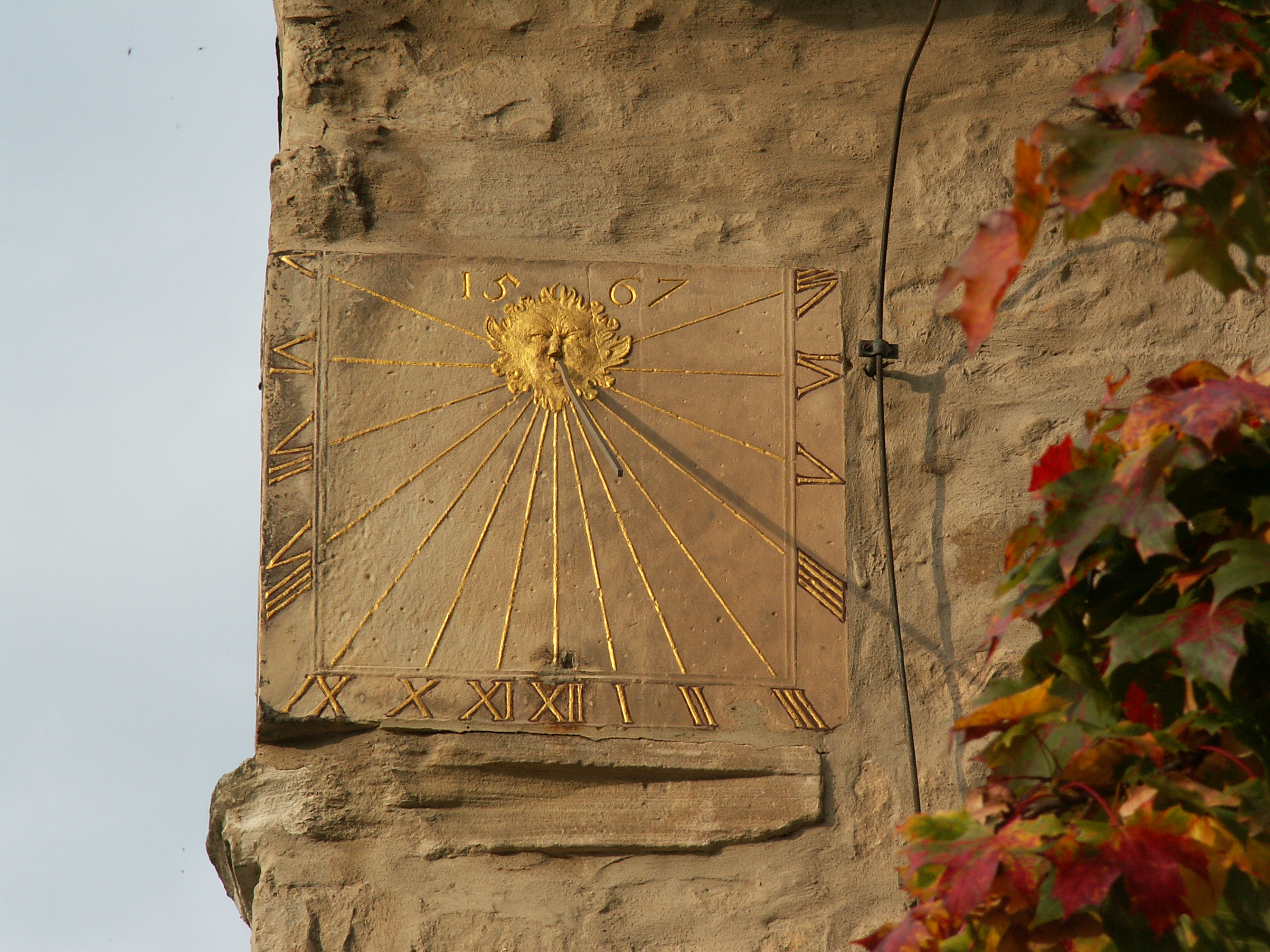 Sonnenuhr der Margarethenkirche zu Ascherleben